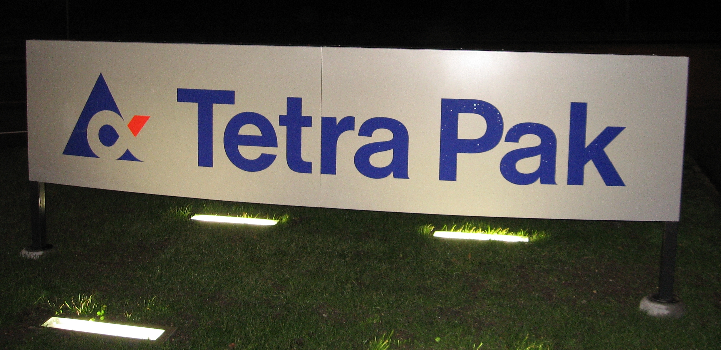 Tetra Pak-skylt i Lund